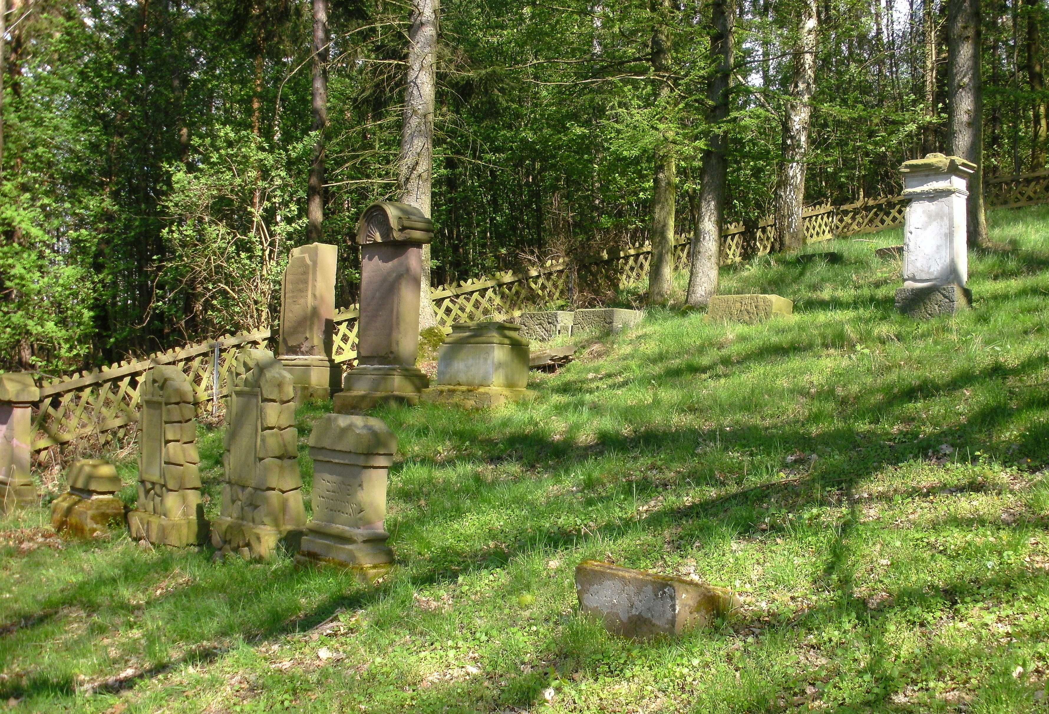 Jüdischer Friedhof (Nörten), Blick von Westen nach Norden. In der ersten Reihe (Vordergrund) von links nach rechts die Grabdenkmäler 15, 14, 13, 12, 11, 10; in der zweiten Reihe von links nach rechts die Grabdenkmäler 18, 17, 16; in der dritten Reihe von links nach rechts die Sockel der Grabdenkmäler 19, 20, 22 sowie das Grabdenkmal 36; in der hintersten Reihe von links nach rechts die Sockel der Grabdenkmäler 37 und 23.